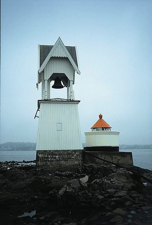 Tåkeklokken på Torgersøya